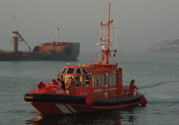 Salvamento Marítimo remolcó al Tiburón III hasta las costas de Ceuta